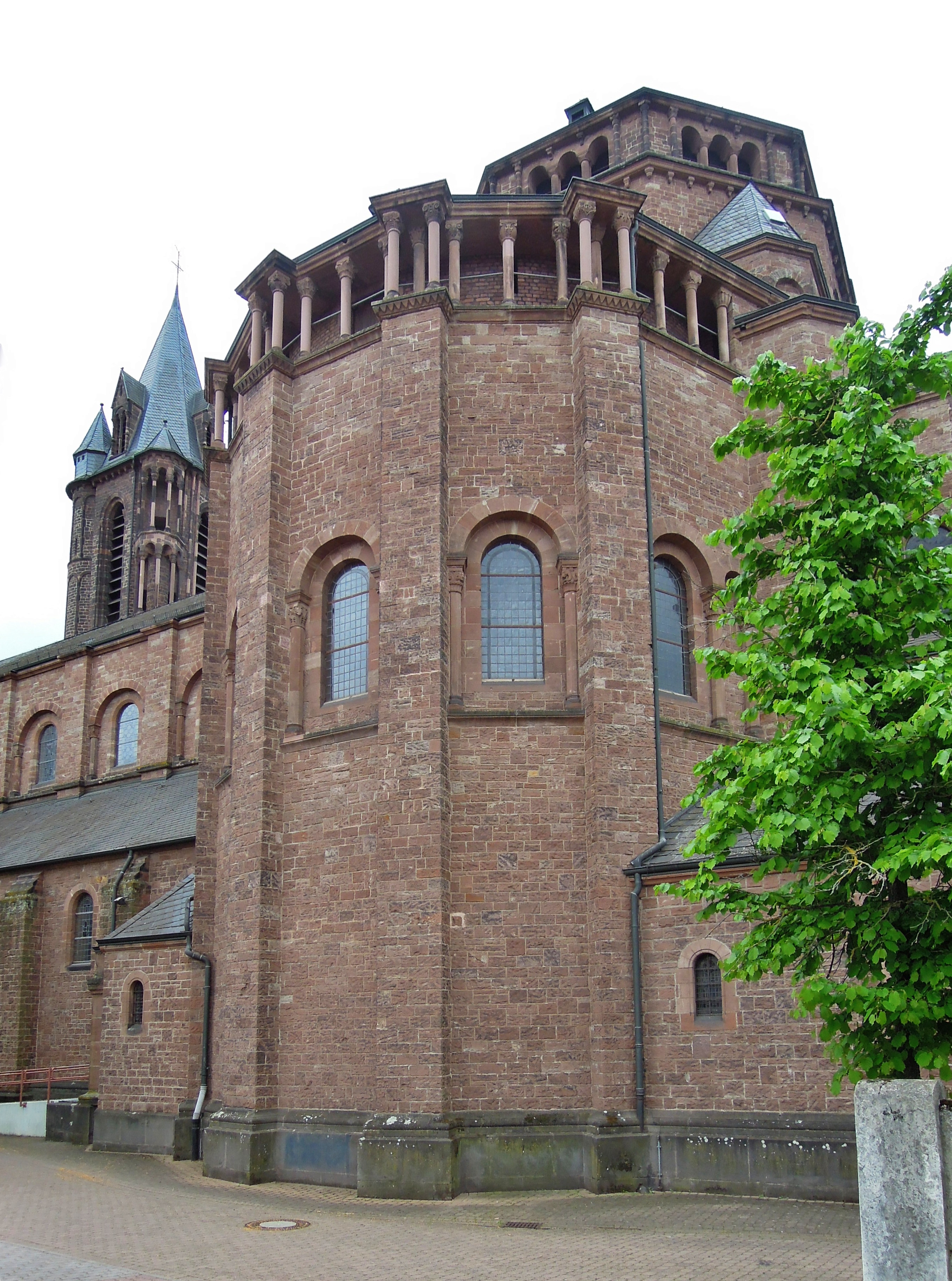 Dillingen, Saardom (Ausschnitt)